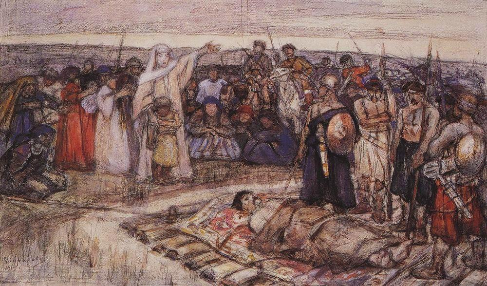 Princess Olga meets the body of her husband, great prince Igor. Княгиня Ольга встречает тело князя Игоря. Эскиз неосуществленной картины. Бумага, гуашь, акварель, итальянский карандаш. Государственный Русский музей, Санкт-Петербург.